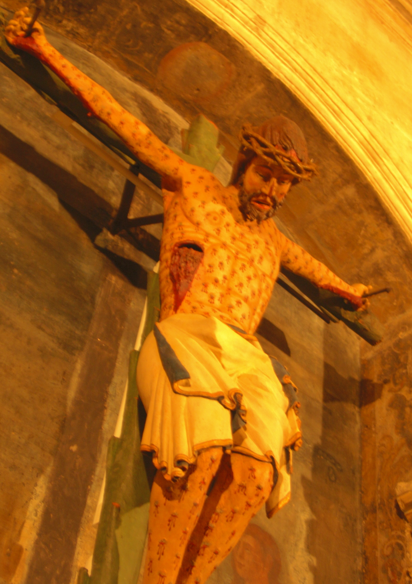 Cristo de Burgos, crucifijo original S.XI, Iglesia de San Gil Abad, Burgos (España).